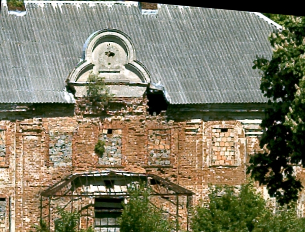 Żelazo - dawny dwór Bandemerów